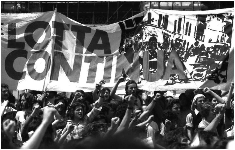 Manifestazione di Lotta Continua 1973